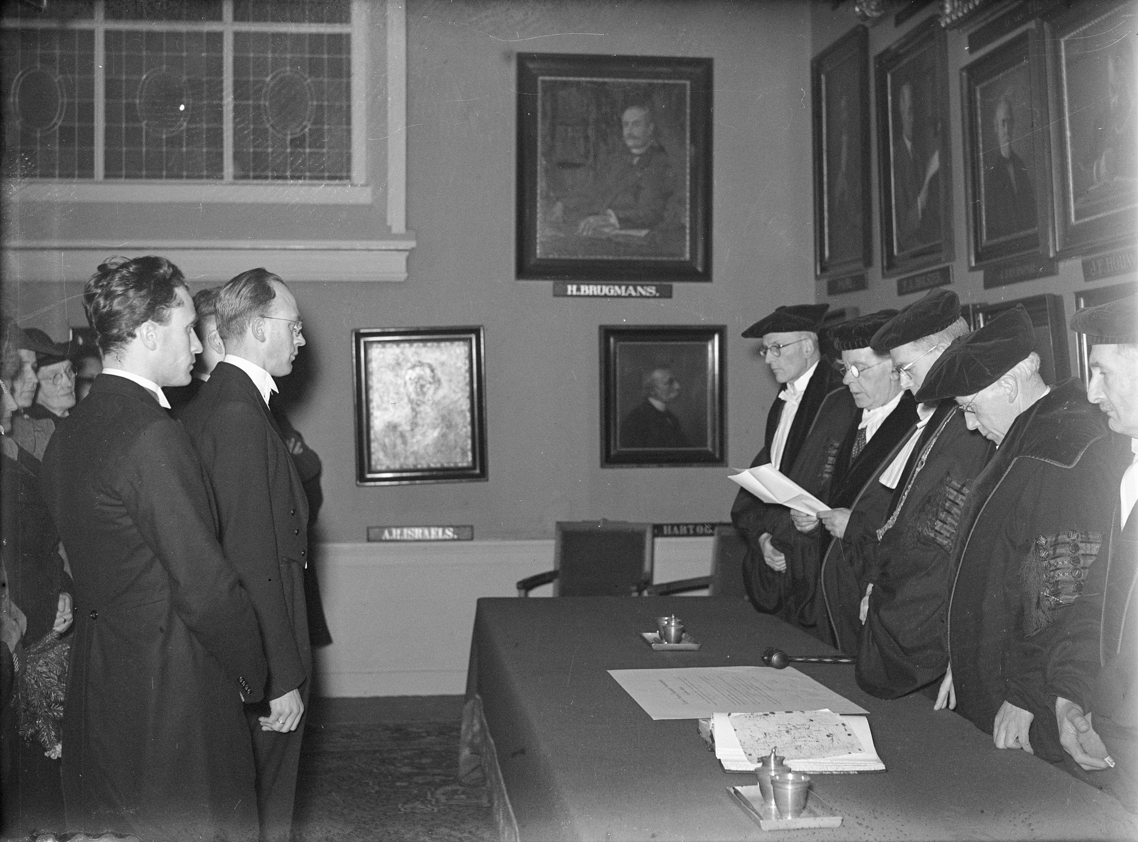 Collectie / Archief : Fotocollectie Anefo Reportage / Serie : [ onbekend ] Beschrijving : Promotie aan professor Reynders. [Waarschijnlijk: verdediging van het proefschrift Ramanspectra van een aantal alifatische polychloorverbindingen door George Wilhelm August Rijnders bij hoogleraar A. Aten, op woensdag 6 maart 1946 om 16.00 uur.] Datum : 11 maart 1946 Trefwoorden : PROFESSOR, PROMOTIE Fotograaf : Sagers, Harry / Anefo Auteursrechthebbende : Nationaal Archief Materiaalsoort : Glasnegatief Nummer archiefinventaris : bekijk toegang 2.24.01.09 Bestanddeelnummer : 901-5539